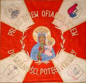 Sztandar Związku Powstańców Śląskich, Bielsko-Biała